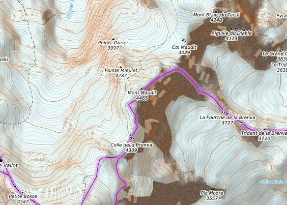 carte réalisée sur umap This map may be incomplete, and may contain errors. Don't rely solely on it for navigation.